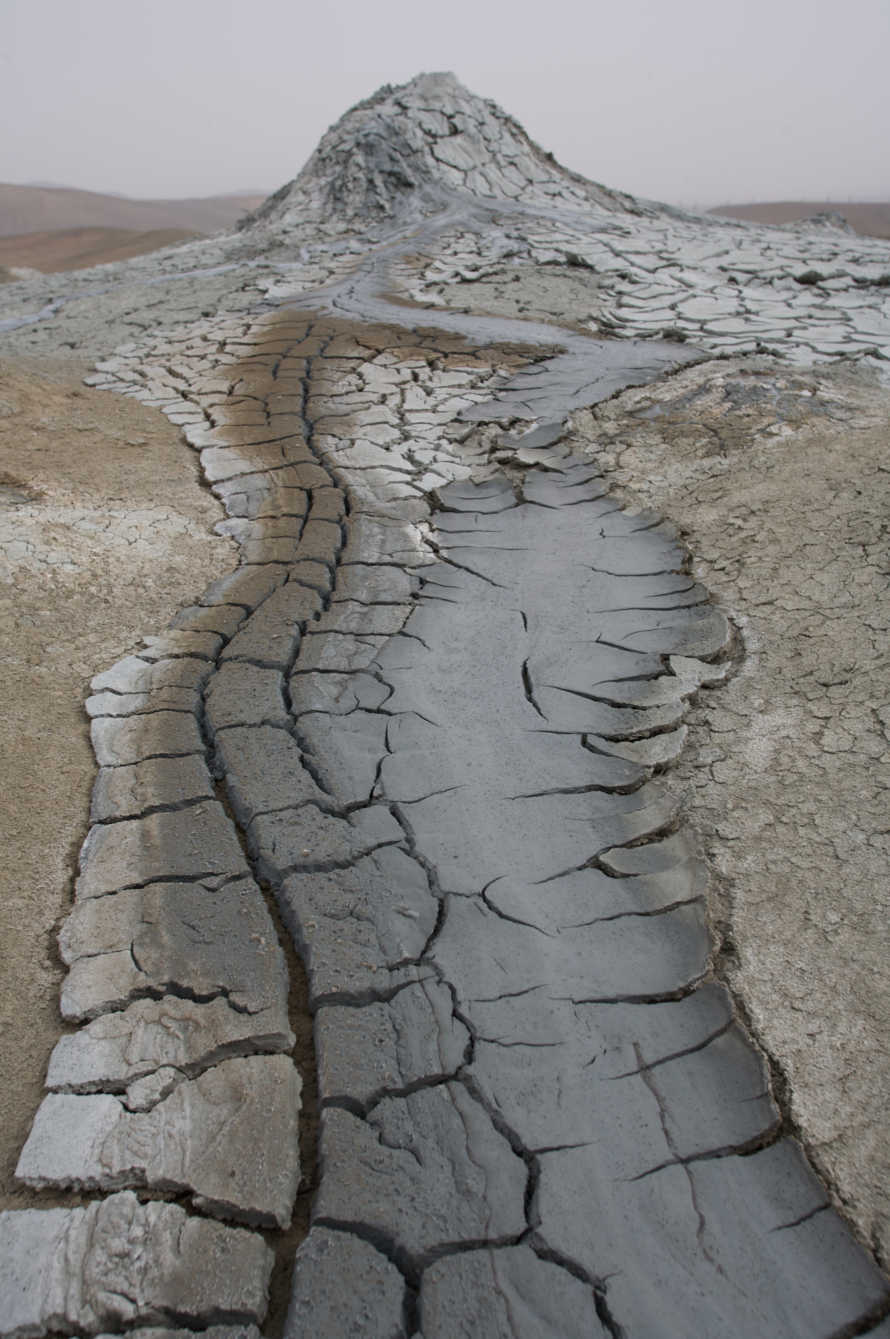 Perekishqul Mud Volcanoes